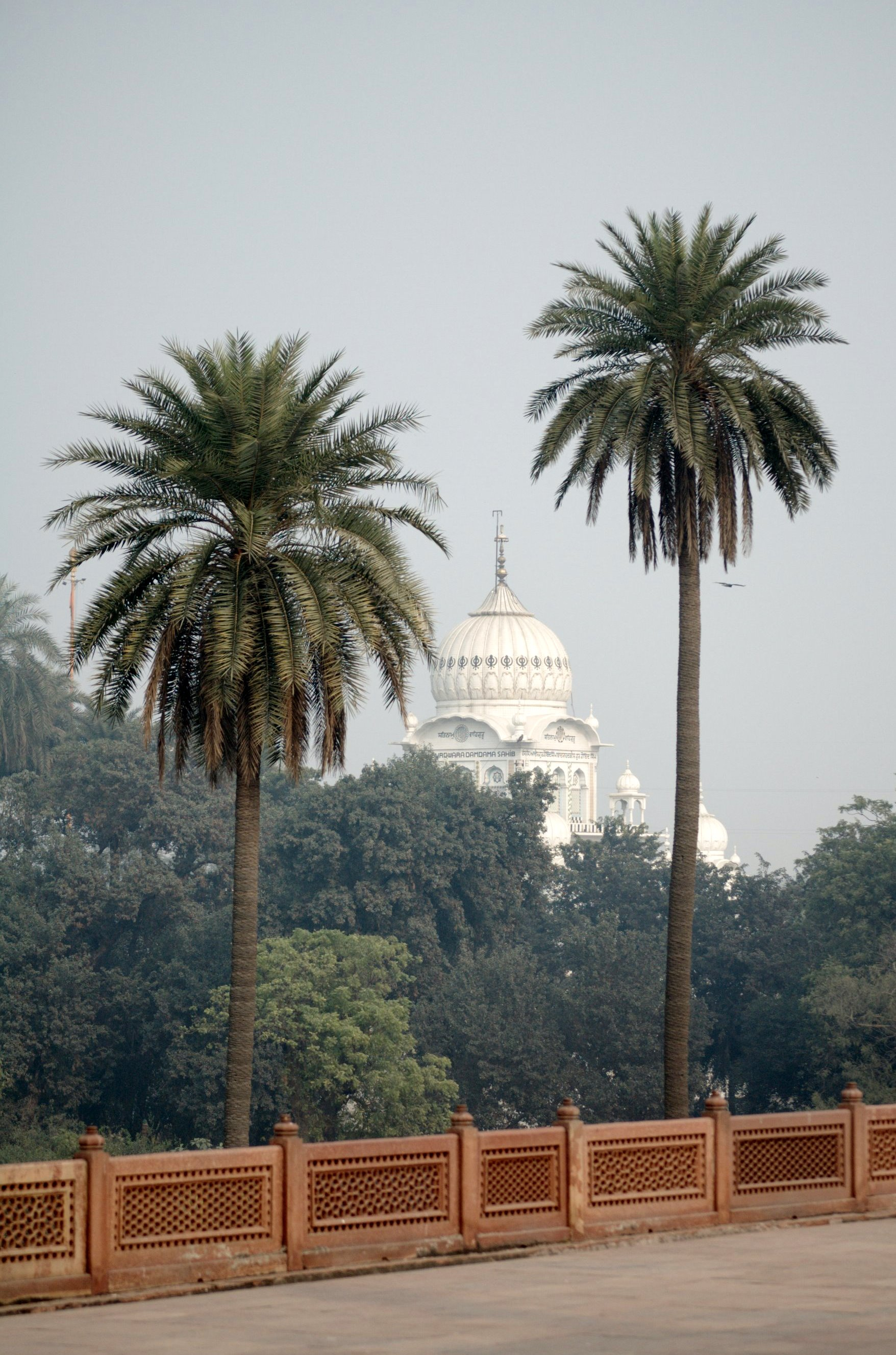 Gurdwara Damdama Sahib, Delhi.